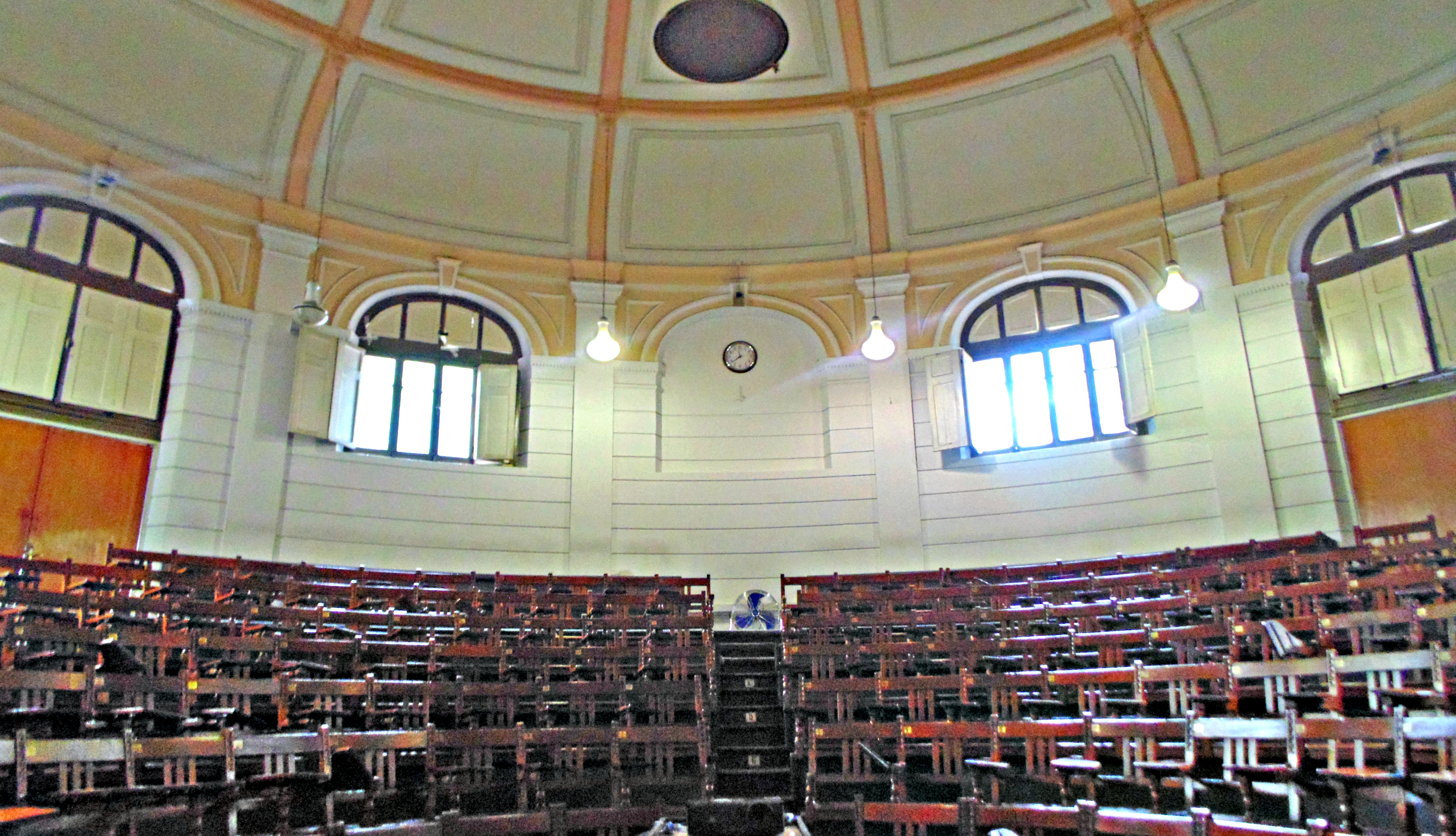 Vista interior del Anfiteatro Profesor José Joaquín Aguirre